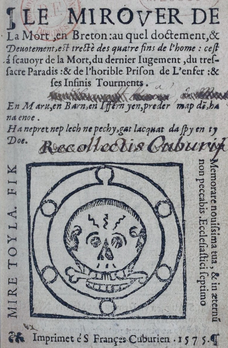 "Le Mirouer de la mort", livre écrit en 1519, mystère de 3602 vers, imprimé au monastère de saint-François de Cuburien en 1575.